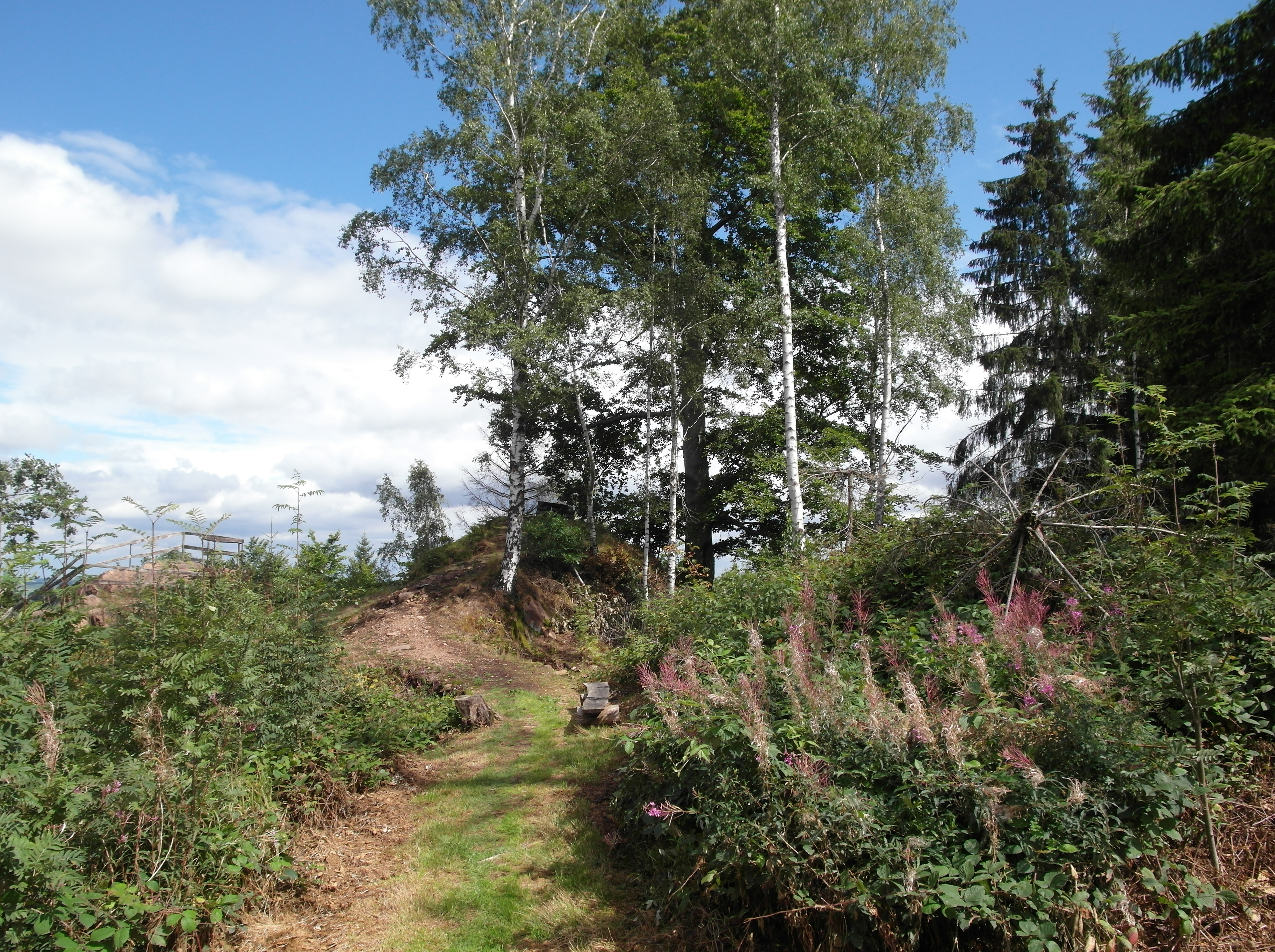 12.08.2017 09638 Lichtenberg/Erzgebirge: Auf dem Gipfel des Burgberges befand sich die mittelalterliche Höhenburg Lichtenberg (GMP: 50.813046,13.461059). Die Anlage stammt vermutlich aus dem 14. Jahrhundert. Bauwerksteile sind nicht mehr vorhanden, nur noch Wälle und Gräben. Dafür gibt es eine schöne Ausicht. [SAM1374.JPG]20170812100DR.JPG(c)Blobelt